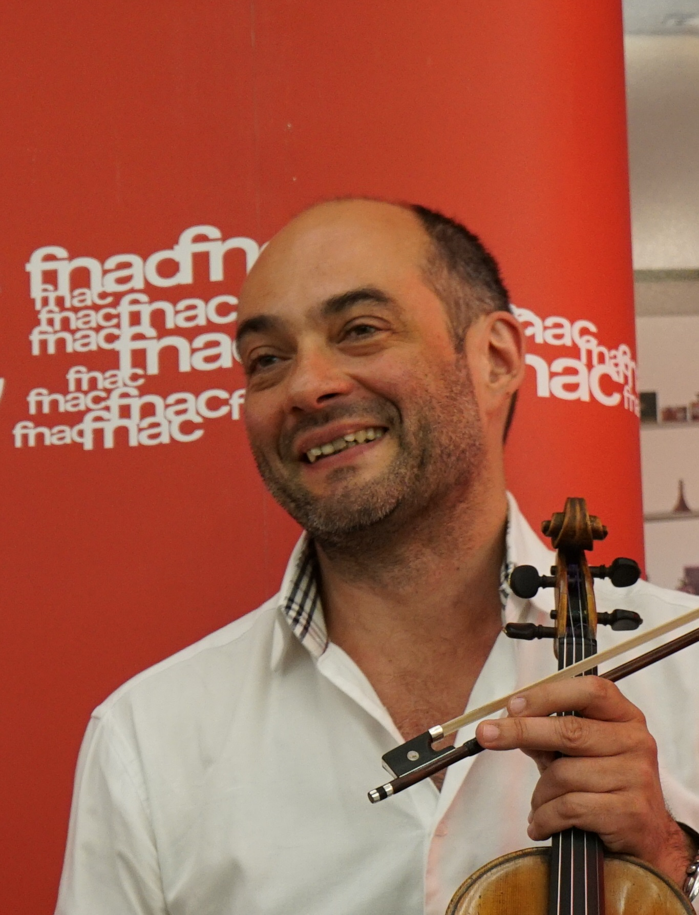 lors de "Flâneries musicales " de 2015.